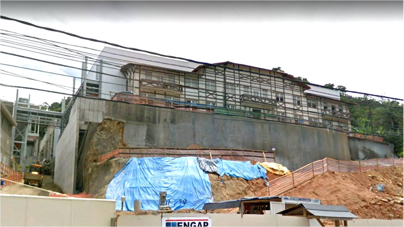 Cervejaria Cidade Imperial, em construção (2017)